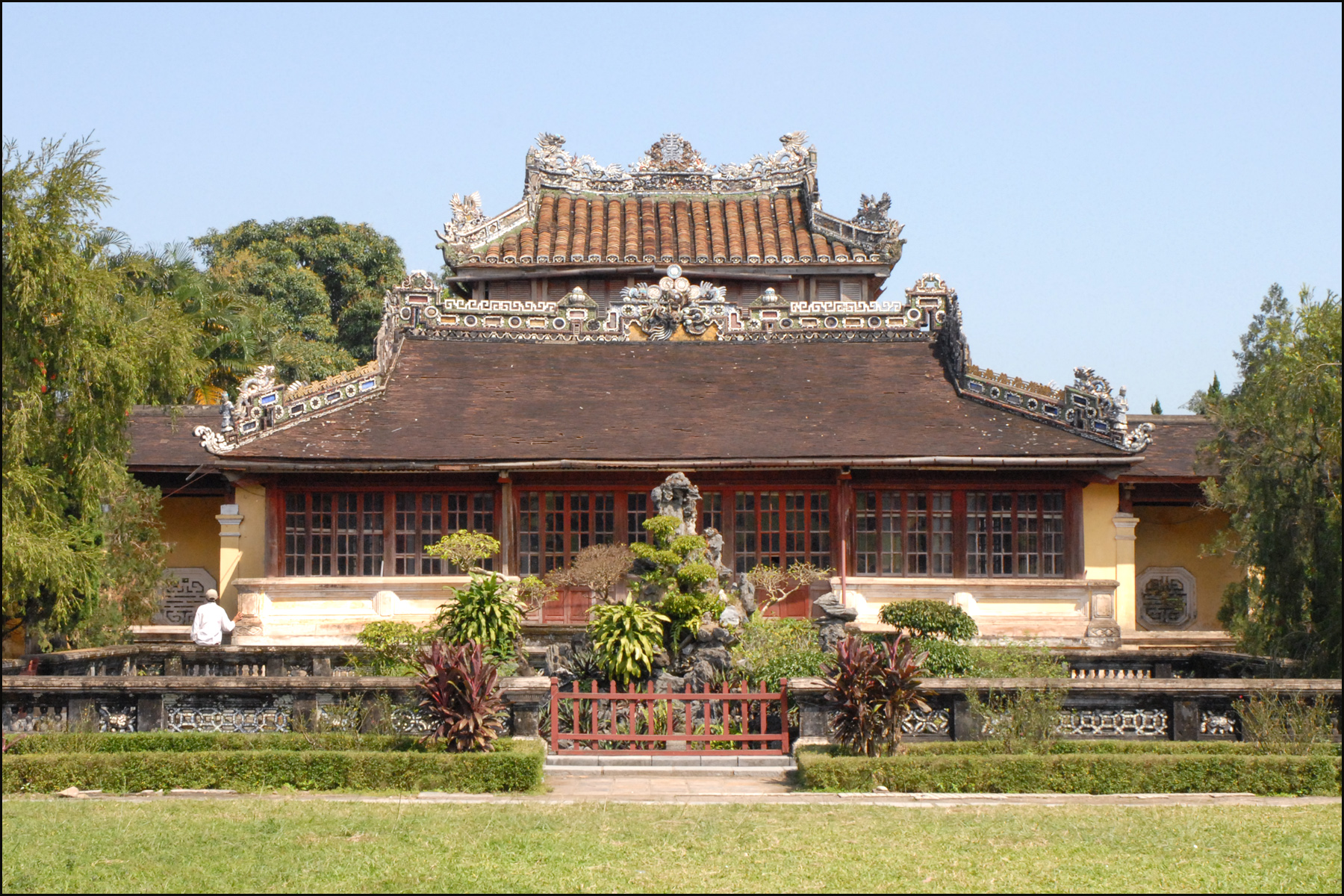 Le pavillon de lecture est le seul bâtiment de la "cité pourpre interdite" à avoir échappé aux destructions causées par les guerres. Il possède un décor de mosaïques remarquable. Au sein de la cité impériale, la cité pourpre interdite était réservée uniquement à l'usage personnel de l'empereur.